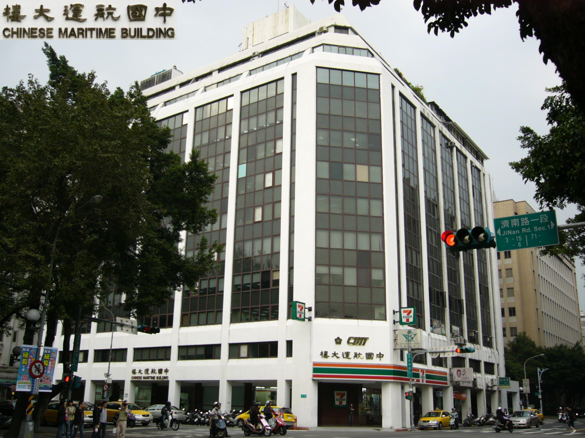 位於台灣台北市中正區濟南路一段的中國航運大樓